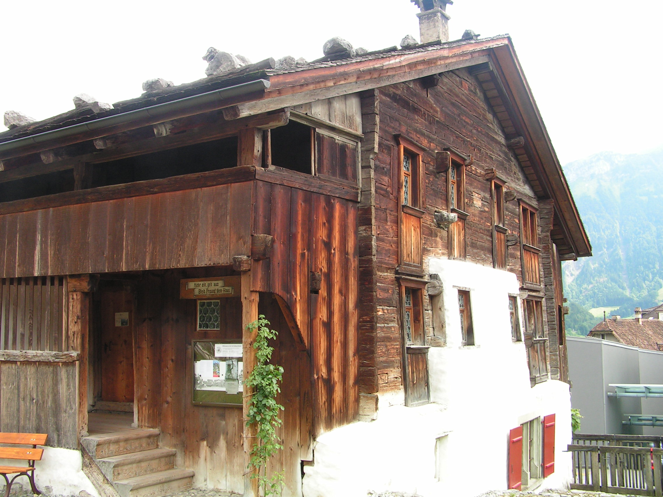 Holzhaus Bethlehem in Schwyz